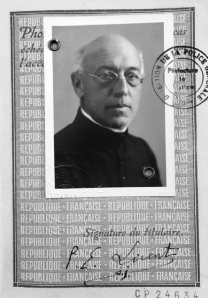 中文（中国大陆）: 桑志华护照照片 巴黎耶稣会档案馆藏